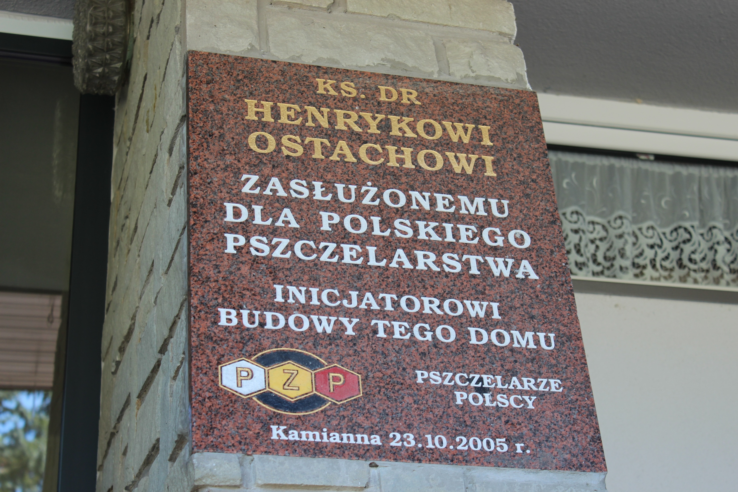 Kamianna